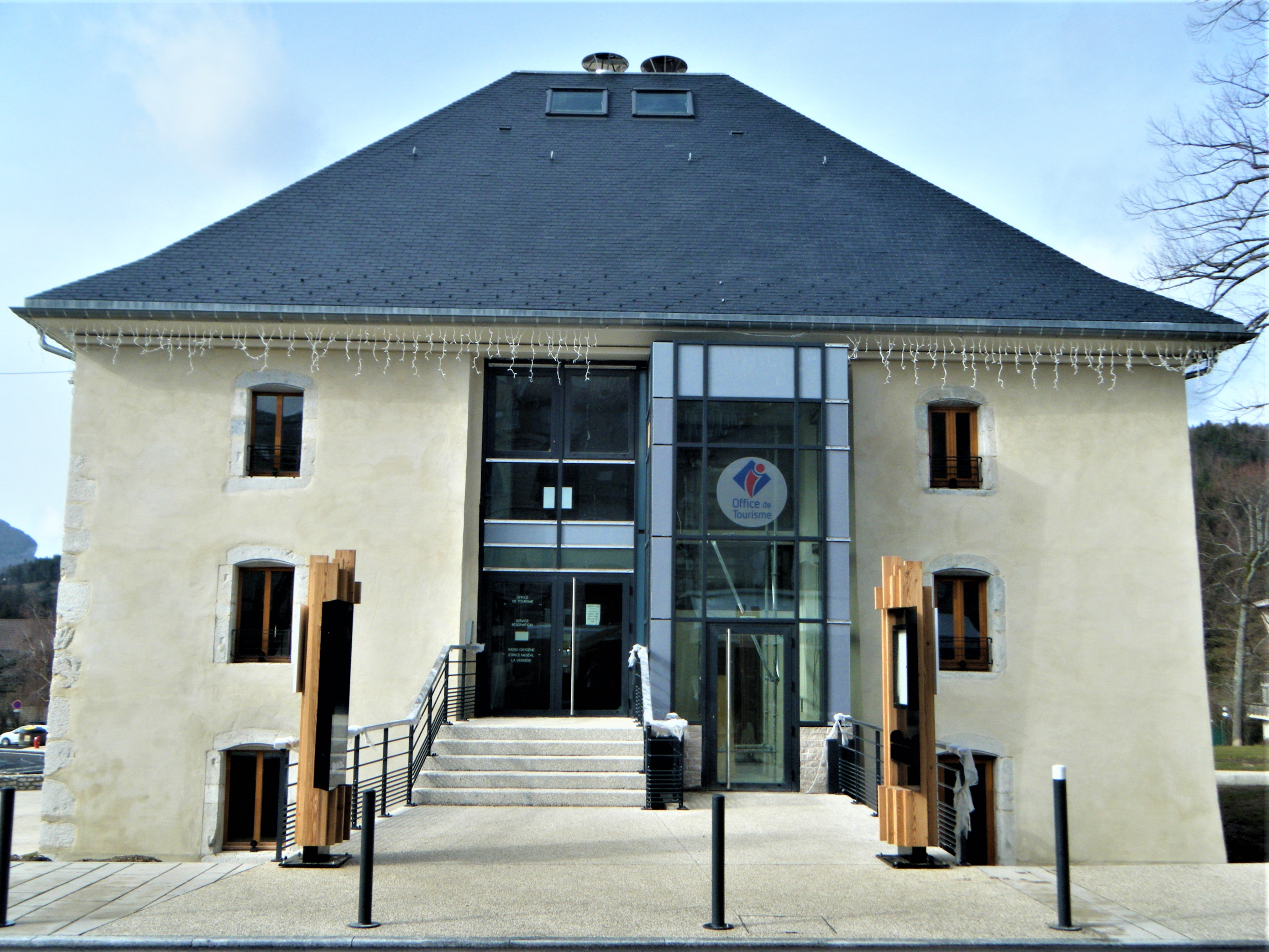 Office de Tourisme de Villard de Lans